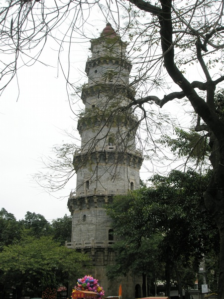 潮阳文光塔